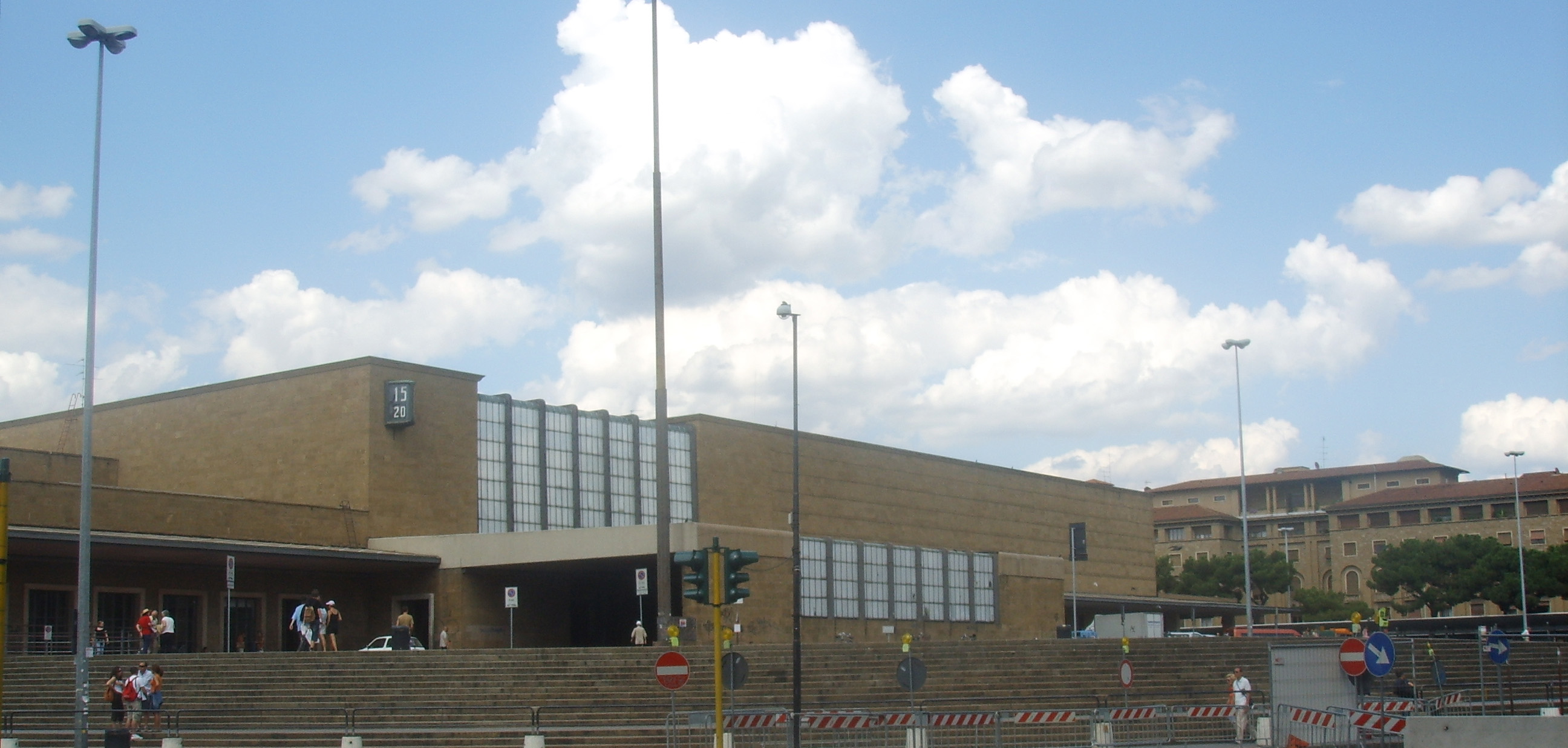 Stazione_di_Santa_Maria_Novella a Firenze. Scatto proprio utente:Sailko